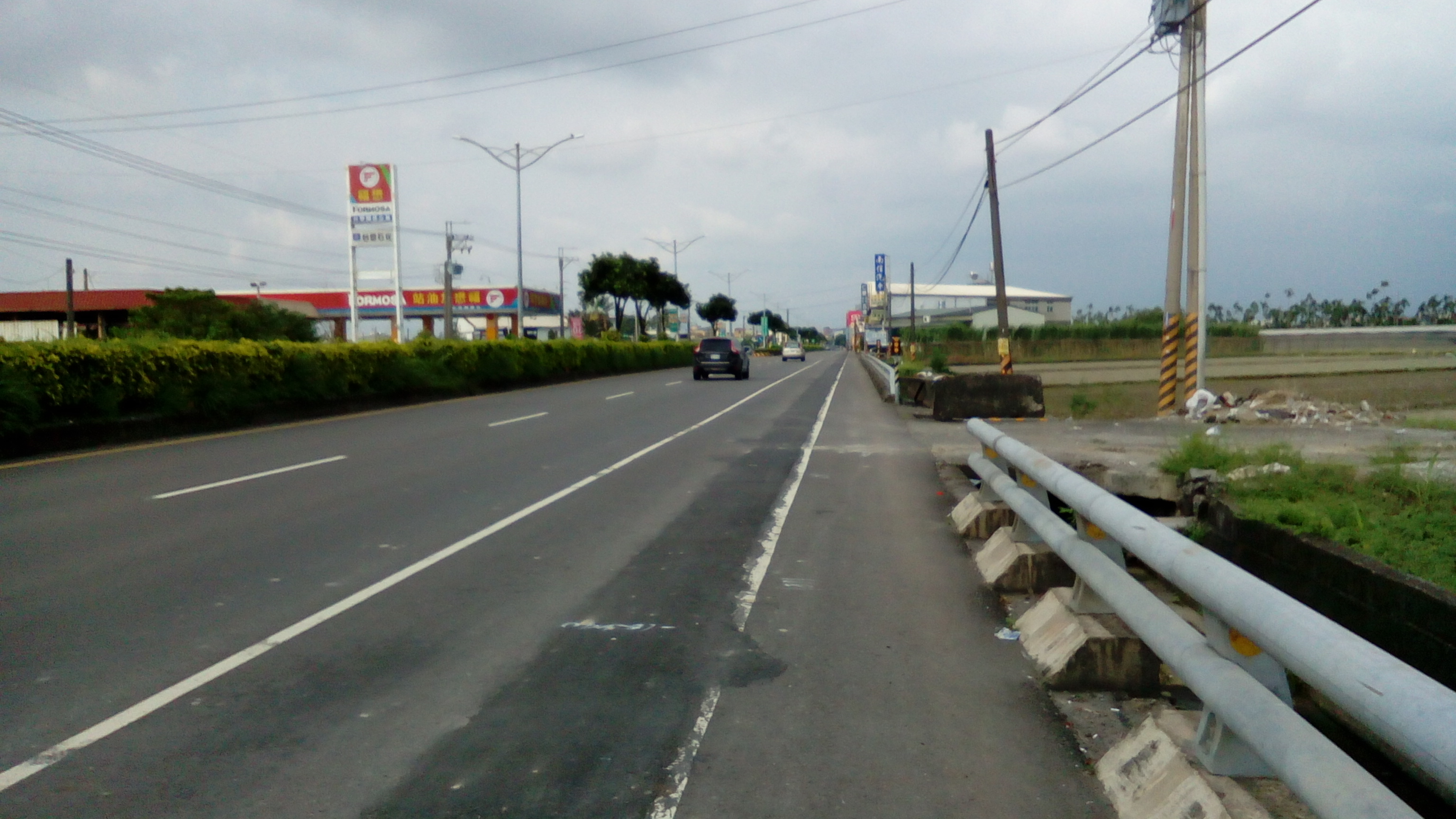 約68k處